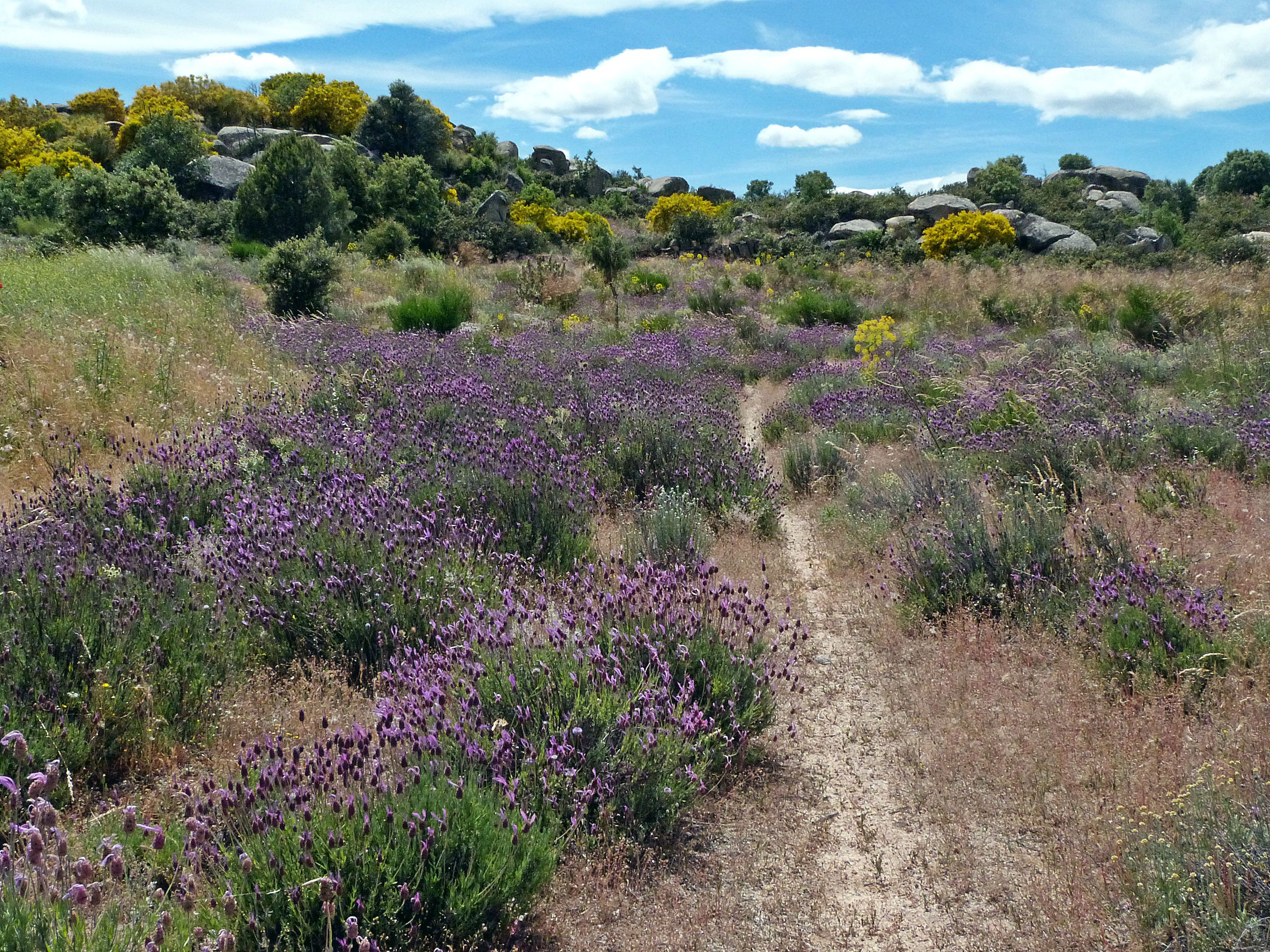 Umland von El Berrueco